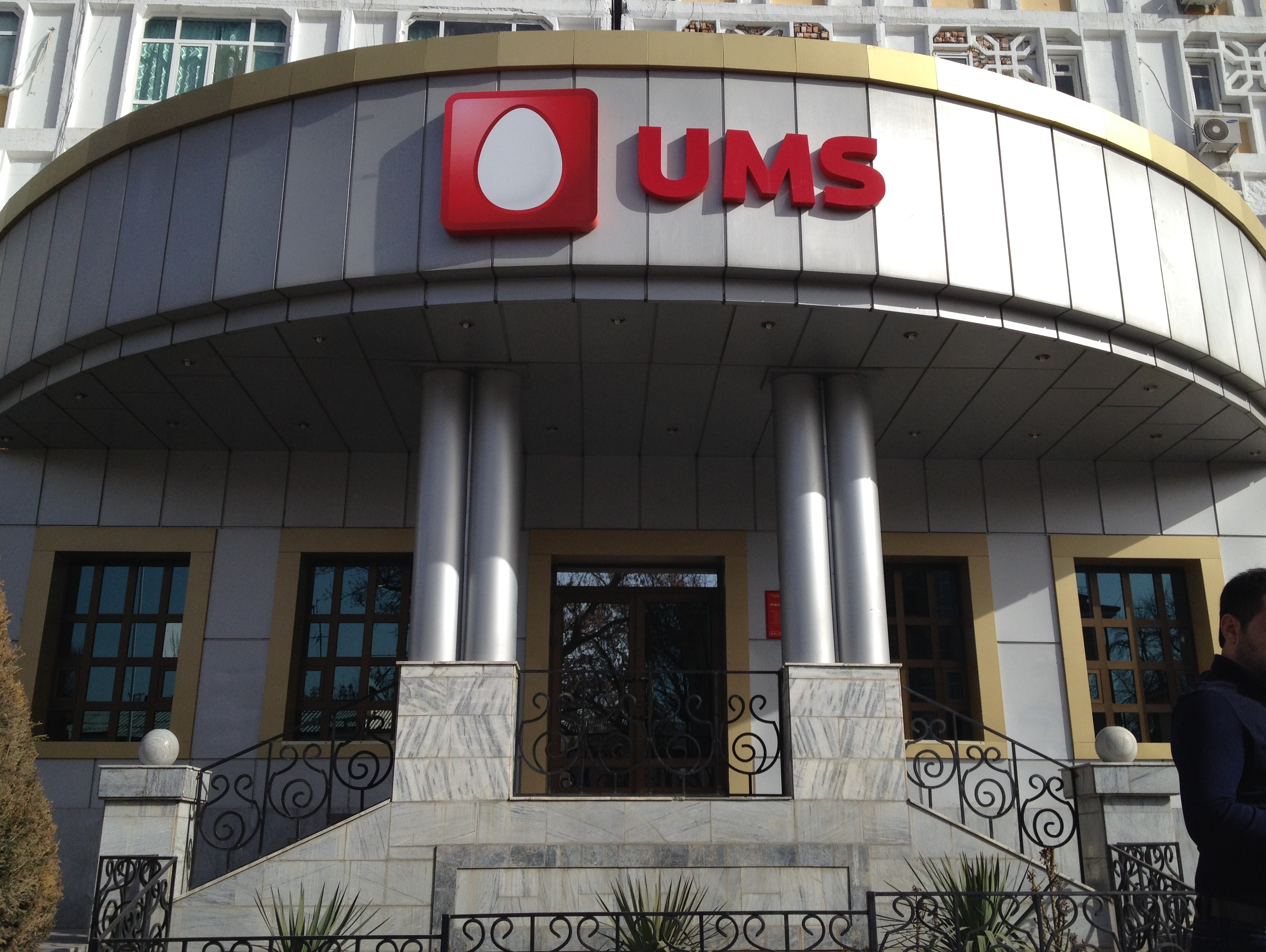 Main UMS Office, Tashkent city, Shaykhontokhur street